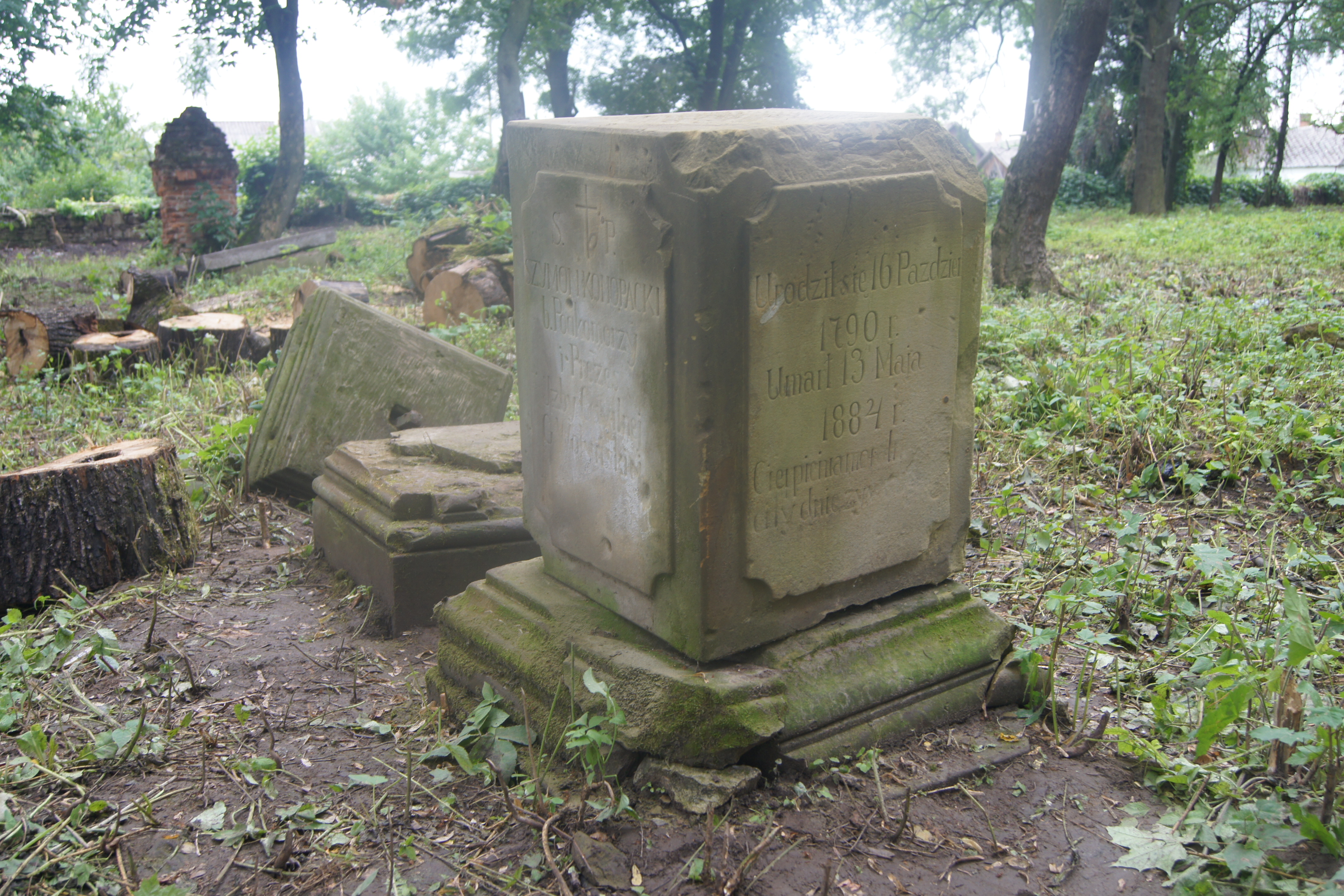 Zdjęcie wykonane podczas akcji "Mogiłę pradziada ocal od zapomnienia"